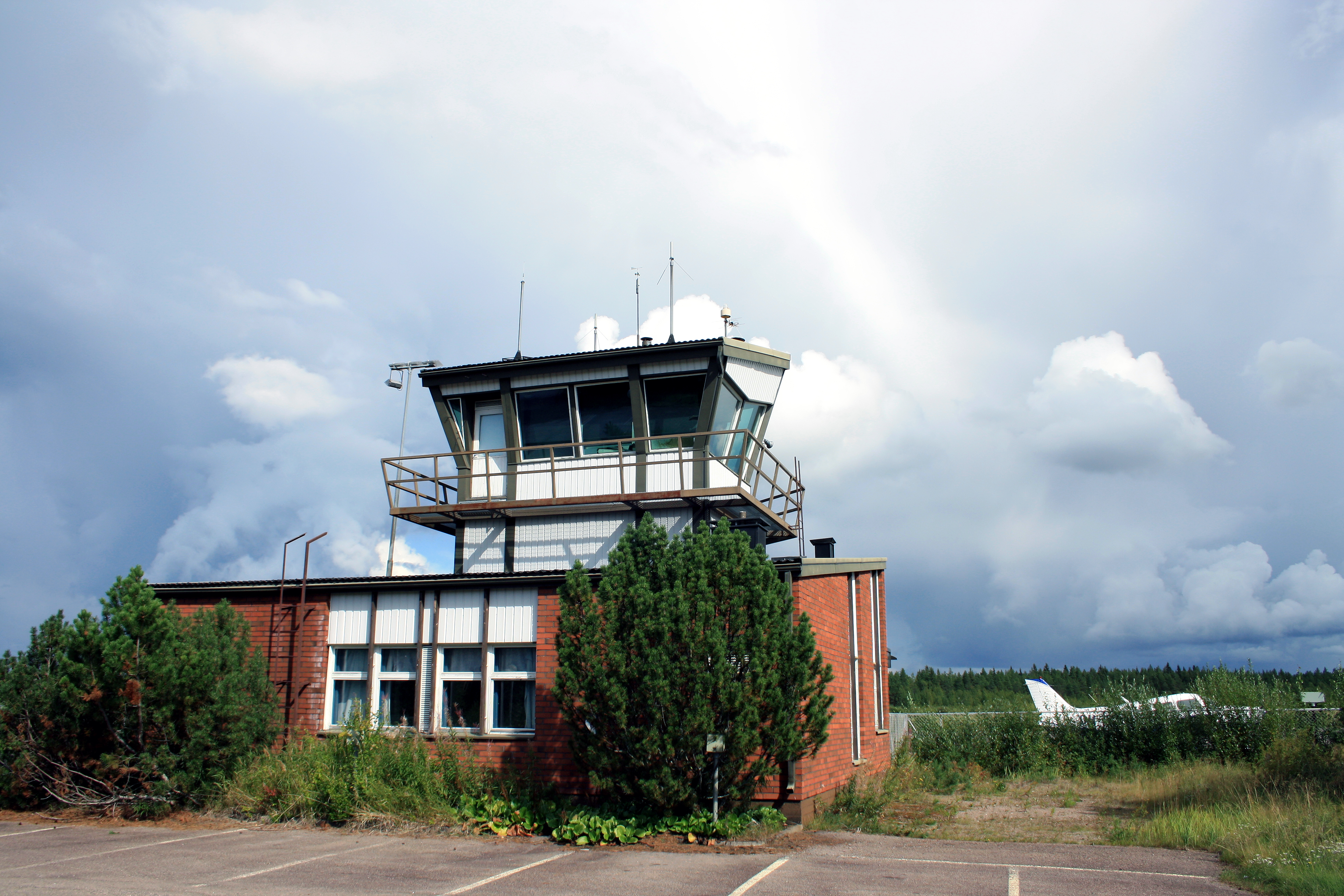 Ylivieskan lentokentän lennonjohtorakennus